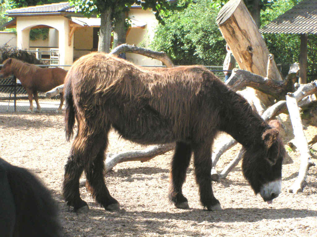 Poitou-Esel im Tierpark Hagenbeck, Hamburg.